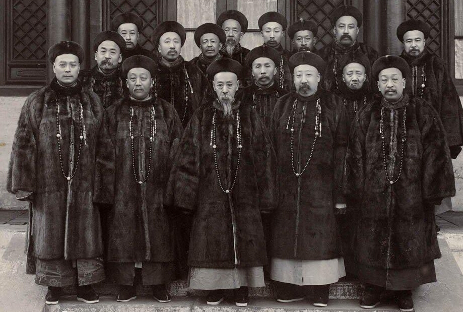 清·皇族內閣